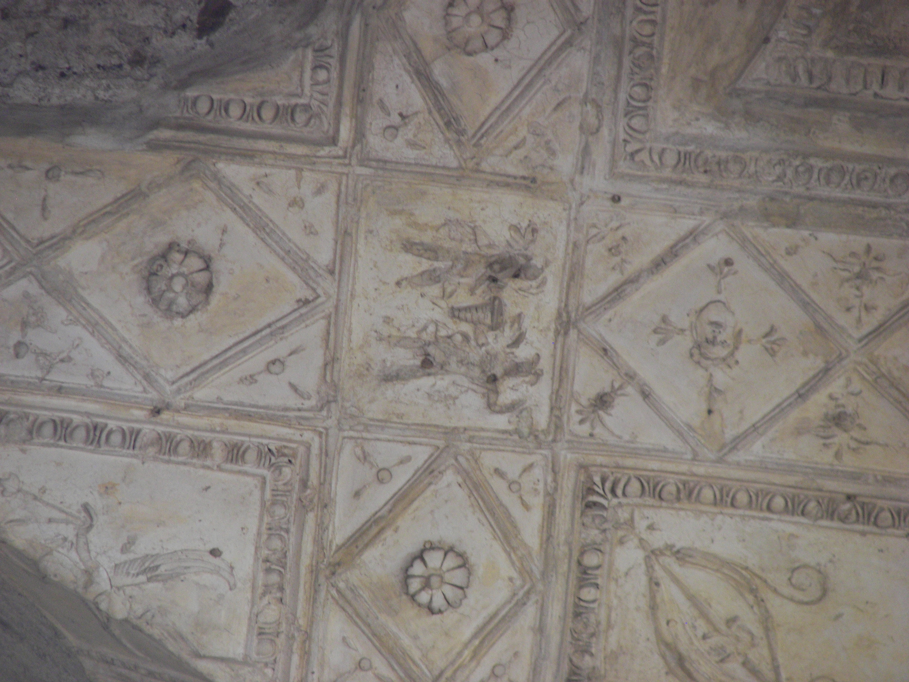 Grandi terme in Villa Adriana, Tivoli.